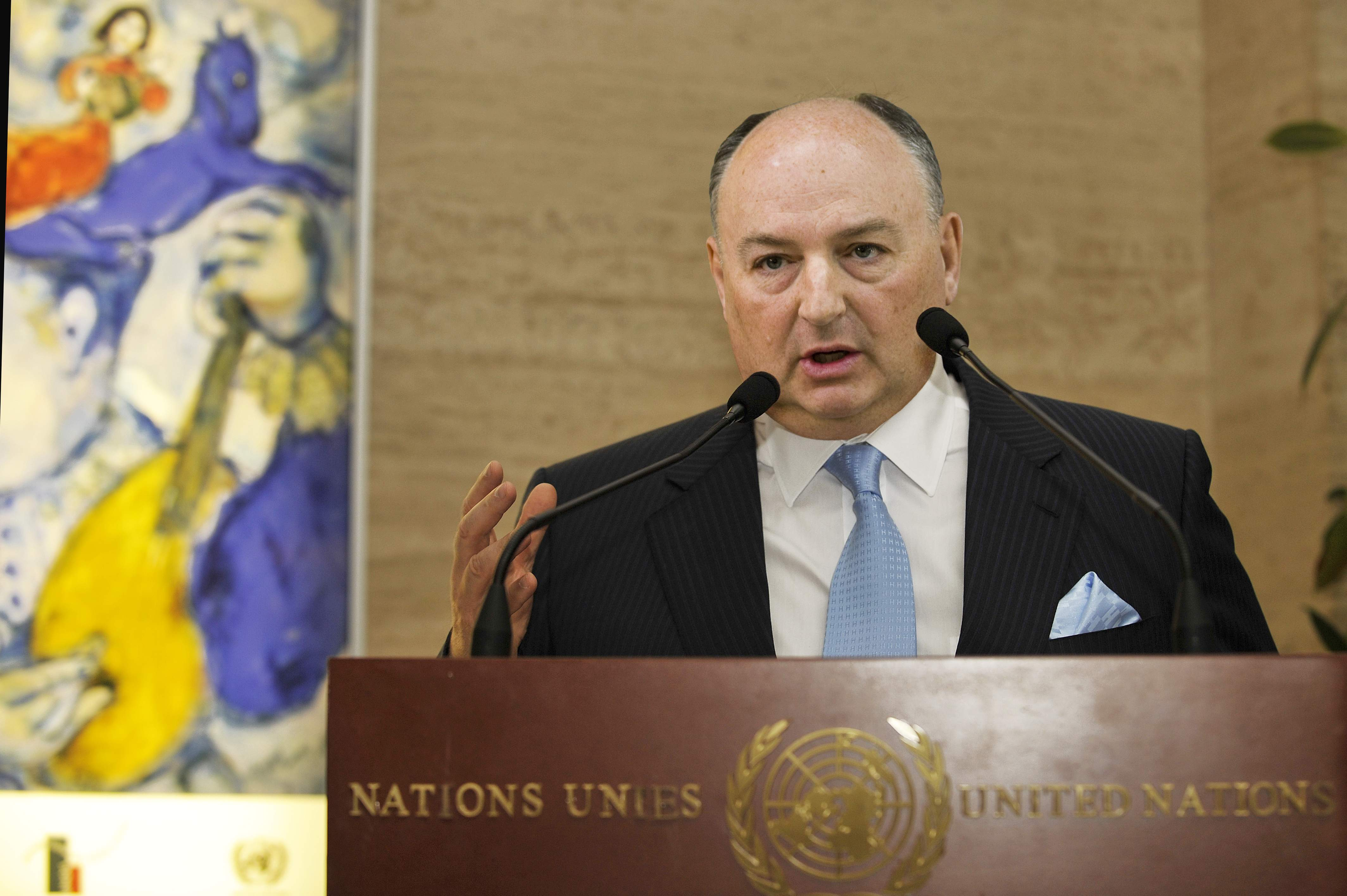 Фотография Вячеслава Моше Кантора за трибуной ООН на открытии выставки МАГМА во Дворце Наций, Женева, 11 июня 2009 г.